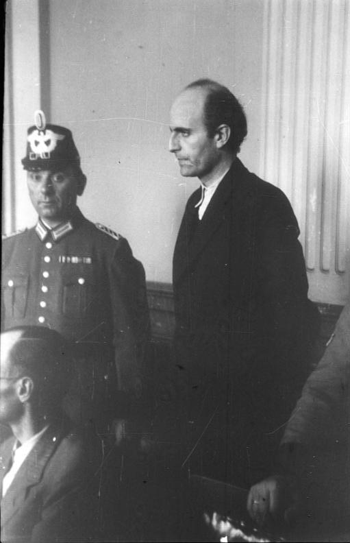 Volksgerichtshof, Adam von Trott zu Solz Adam von Trott zu Solz Prozeß 20. Juli 1944 [Berlin.- Prozess vor dem Volksgerichtshof, Adam von Trott zu Solz] Abgebildete Personen: Trott zu Solz, Adam: Diplomat, Widerstandskämpfer, Prozeß 20. Juli 1944, Deutschland